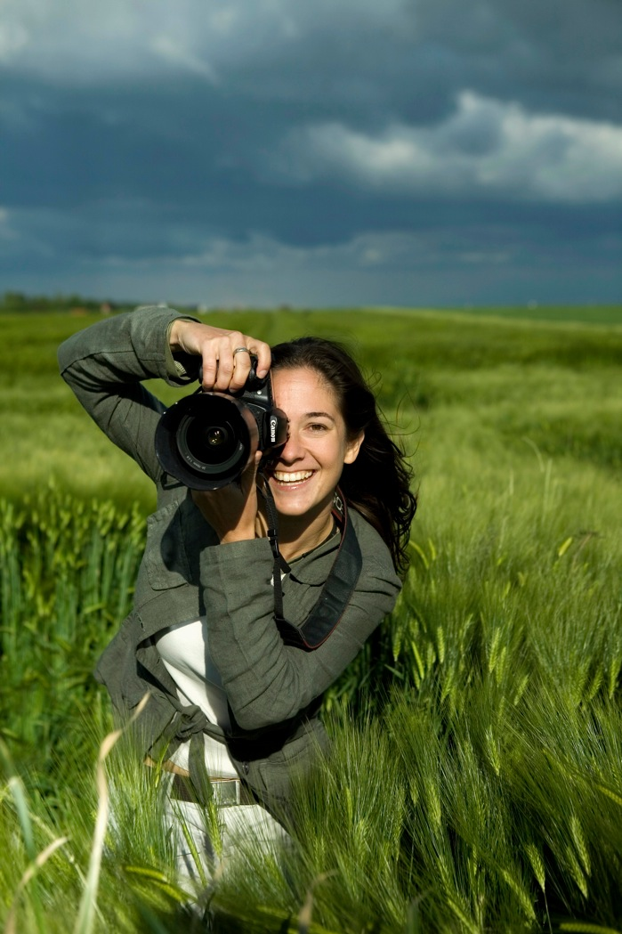 Ulla Lohmann mit ihrer Canon